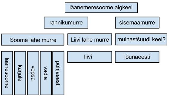 Läänemeresoome keelepuu. Kasutatud andmed pärinevad artiklist: Kallio, Petri (2007). Kantasuomen konsonanttihistoriaa. Mémoires de la Société Finno-Ougrienne 253: 229–250.